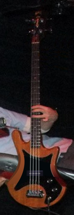 Guild Bass Guitar Cymbals Eat Guitars, Hi Dive Denver CO, 2010-04-01